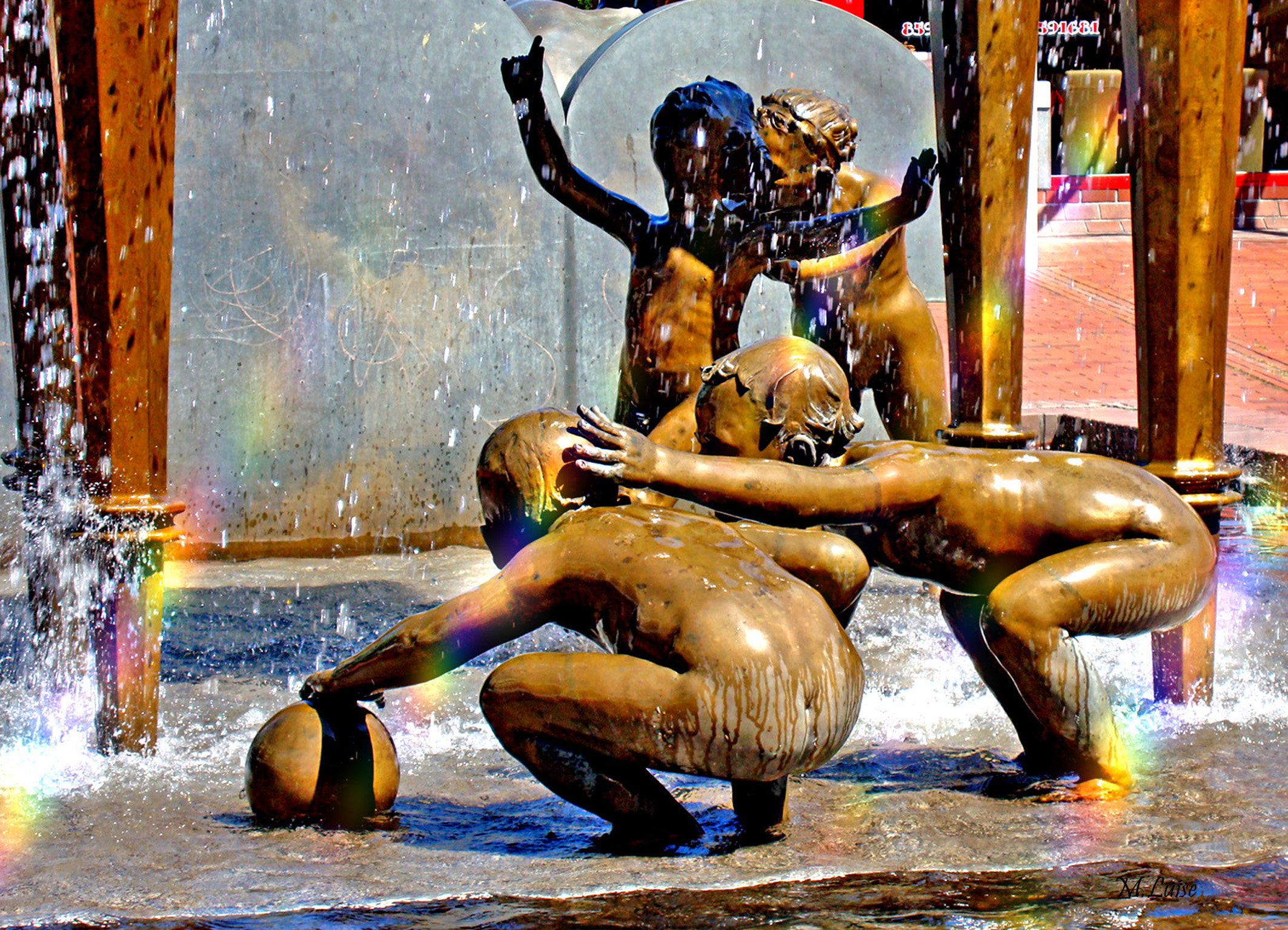 Saarbrücken Malstatt, Marktplatz, Brunnen